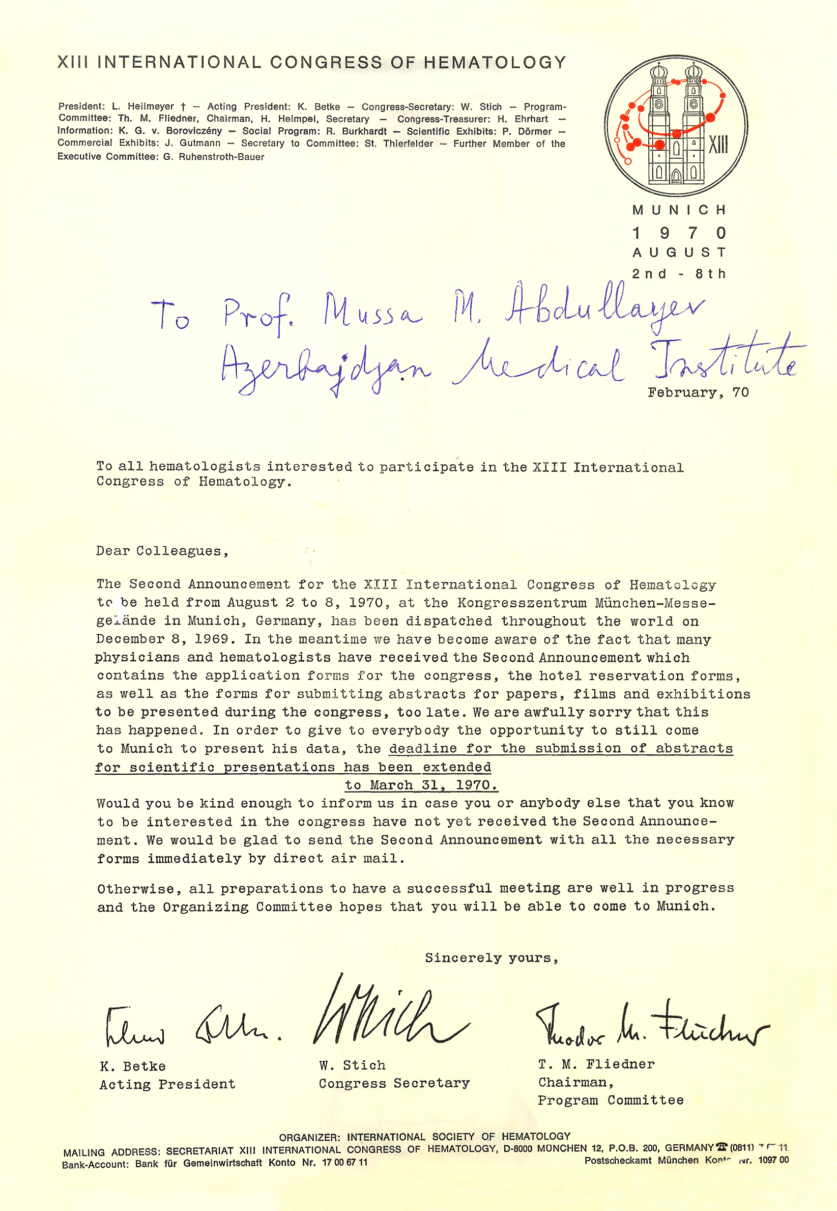 Dəvətnamə